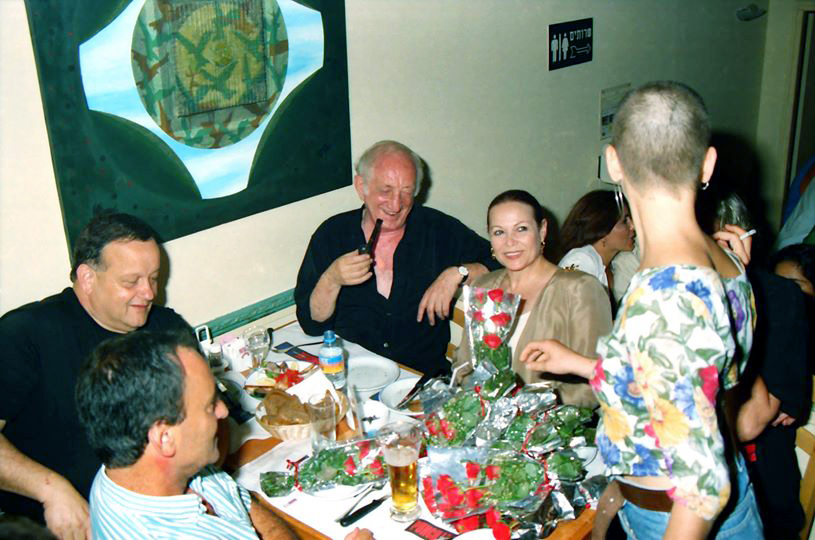 דן שילון ואיציק גליקסברג, במסיבה לרגל תכניתו של יעקב (יענקלה) אגמון "בירה ומצב רוח" בשילוב עם מסיבת הפתעה ליום הולדתה של גילה אלמגור בפאנץ' ליין